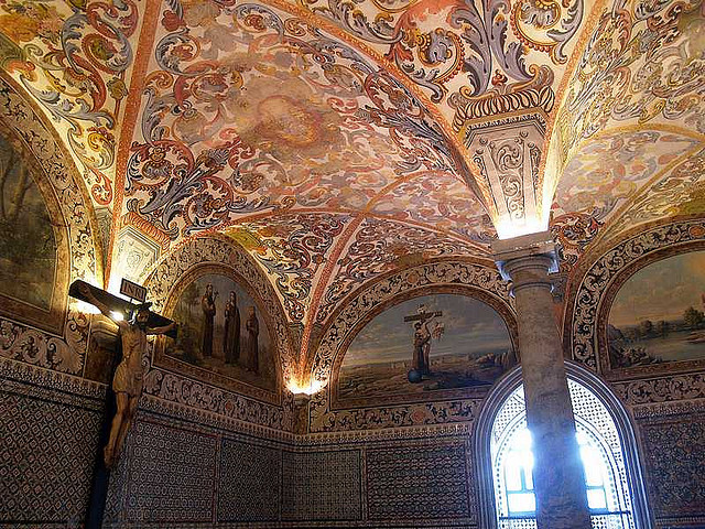 Beja - Chapter House of the old Convento da NS da Conceição